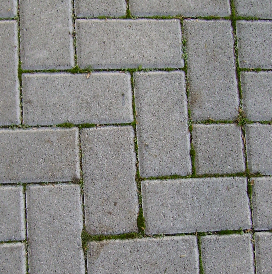 herringbone bond pavement / Fischgrätverband-Pflaster